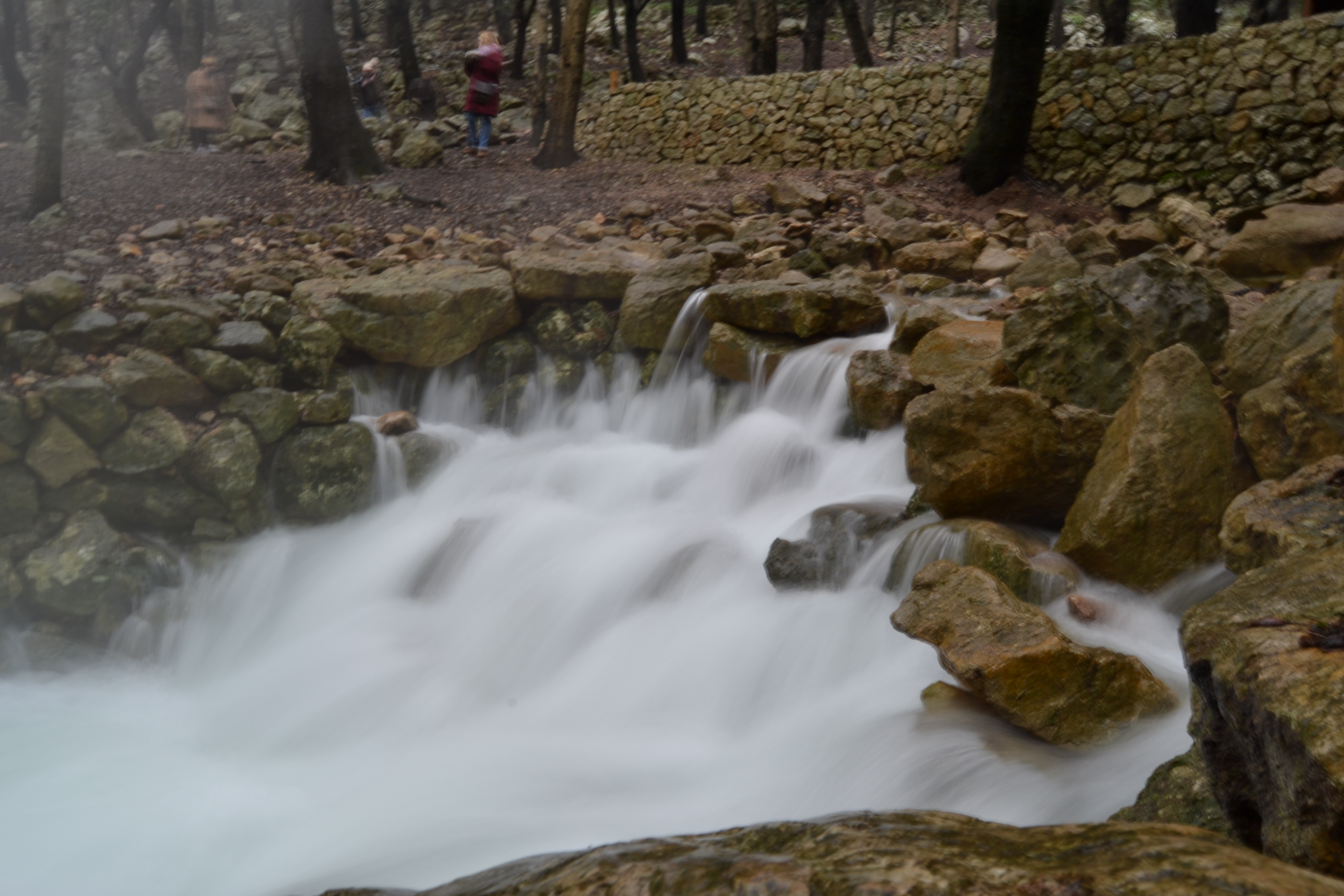 Fonts Ufanes, Campanet, Mallorca This is a a photo of a natural area in the Balearic Islands, Spain, with id: ES530080